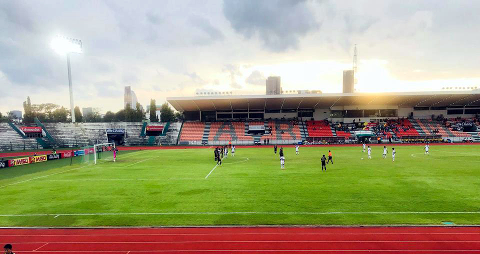 Thai Army Sports Stadion